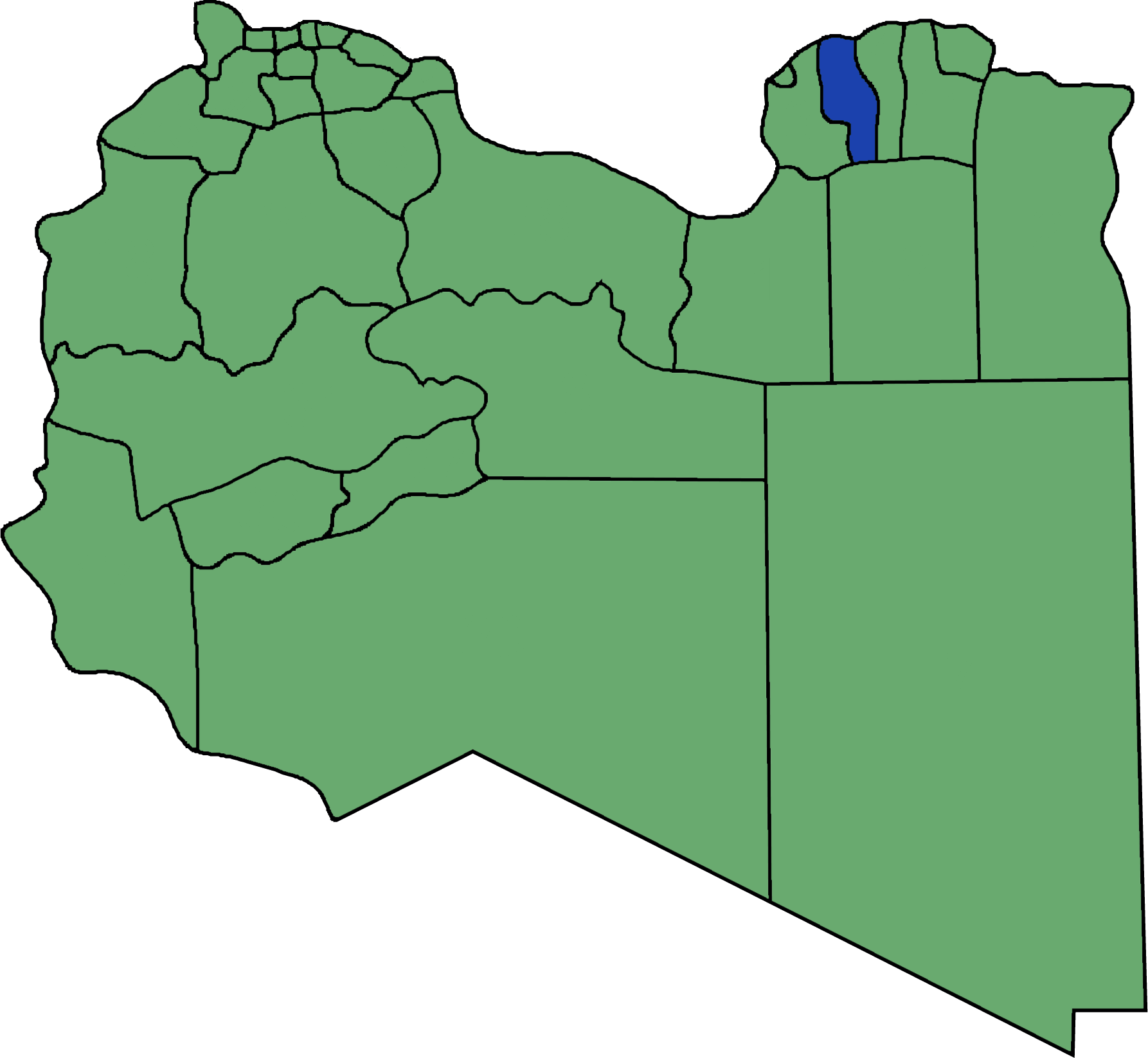 Die neuen Gemeinden (Munizipien) in Libyen. Al Marj hervorgehoben.